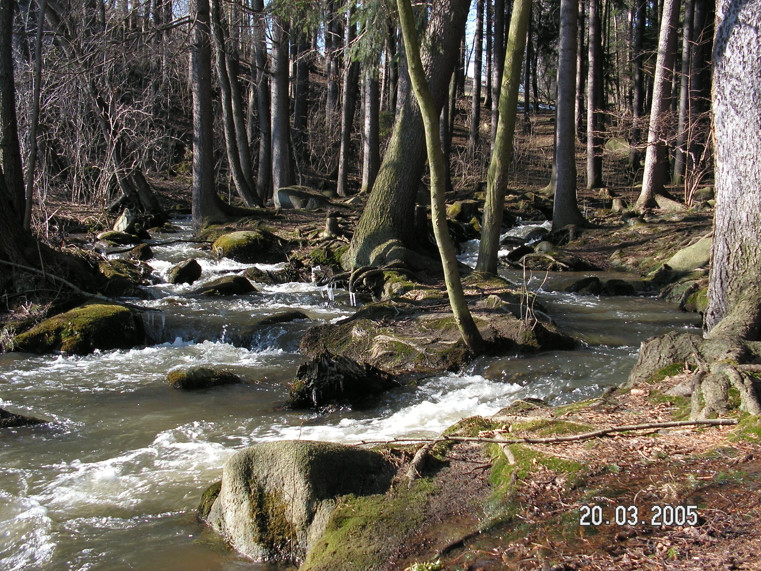 Žebrákovský potok u Světlé nad Sázavou zhruba na 1,5 říčním kilometru. Místo je známé jako Údolíčko.